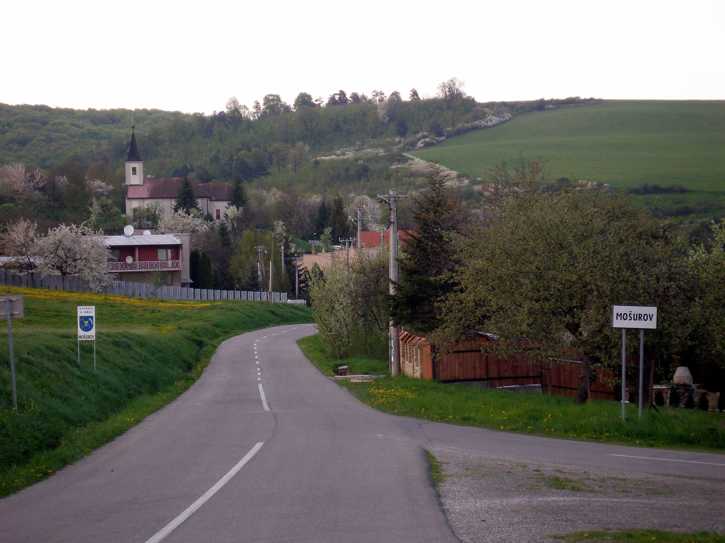 Obec Mošurov okres Prešov región Šariš